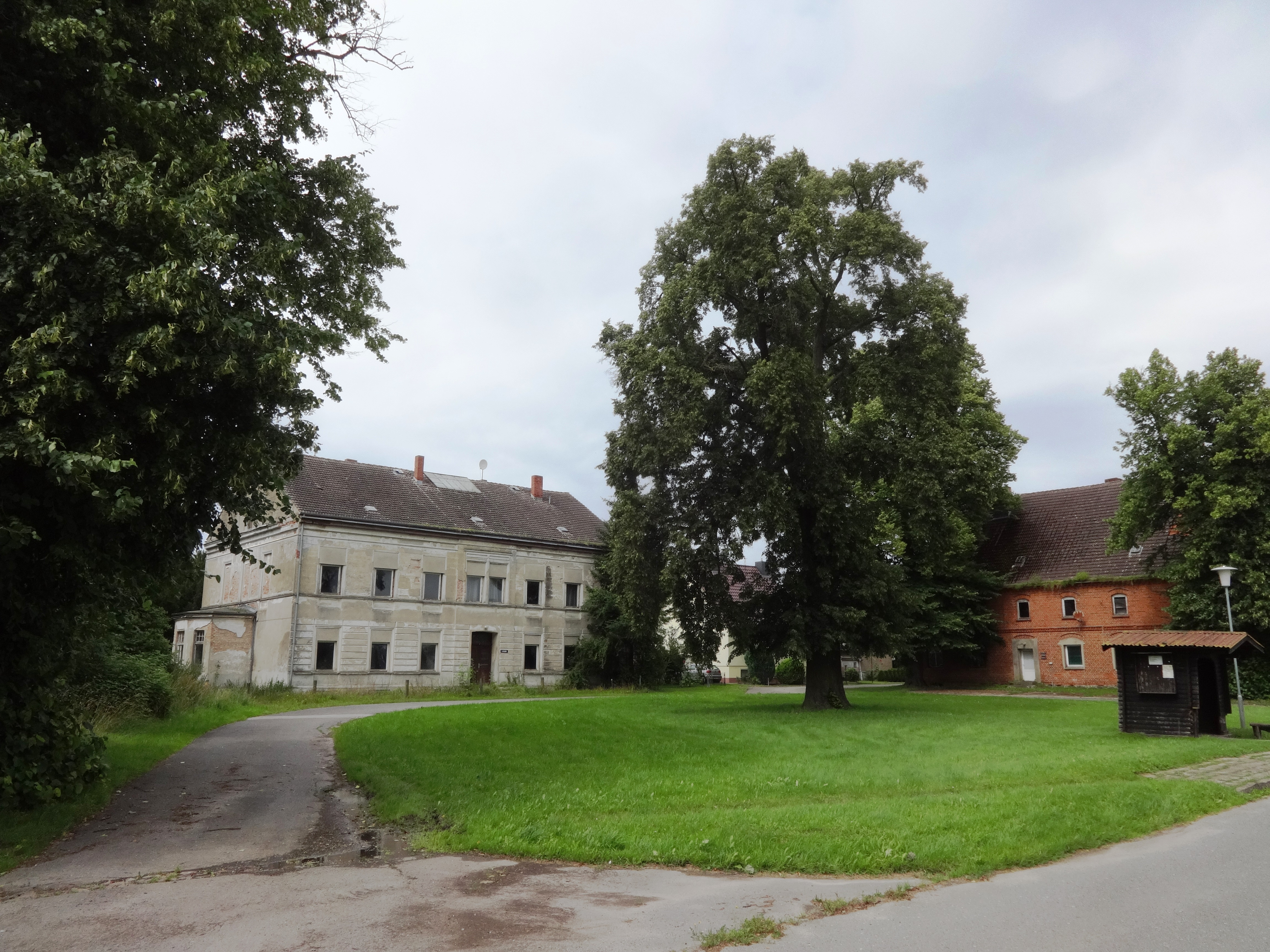 Stilow, ein Ortsteil der Gemeinde Brünzow im Landkreis Vorpommern-Greifswald in Mecklenburg-Vorpommern